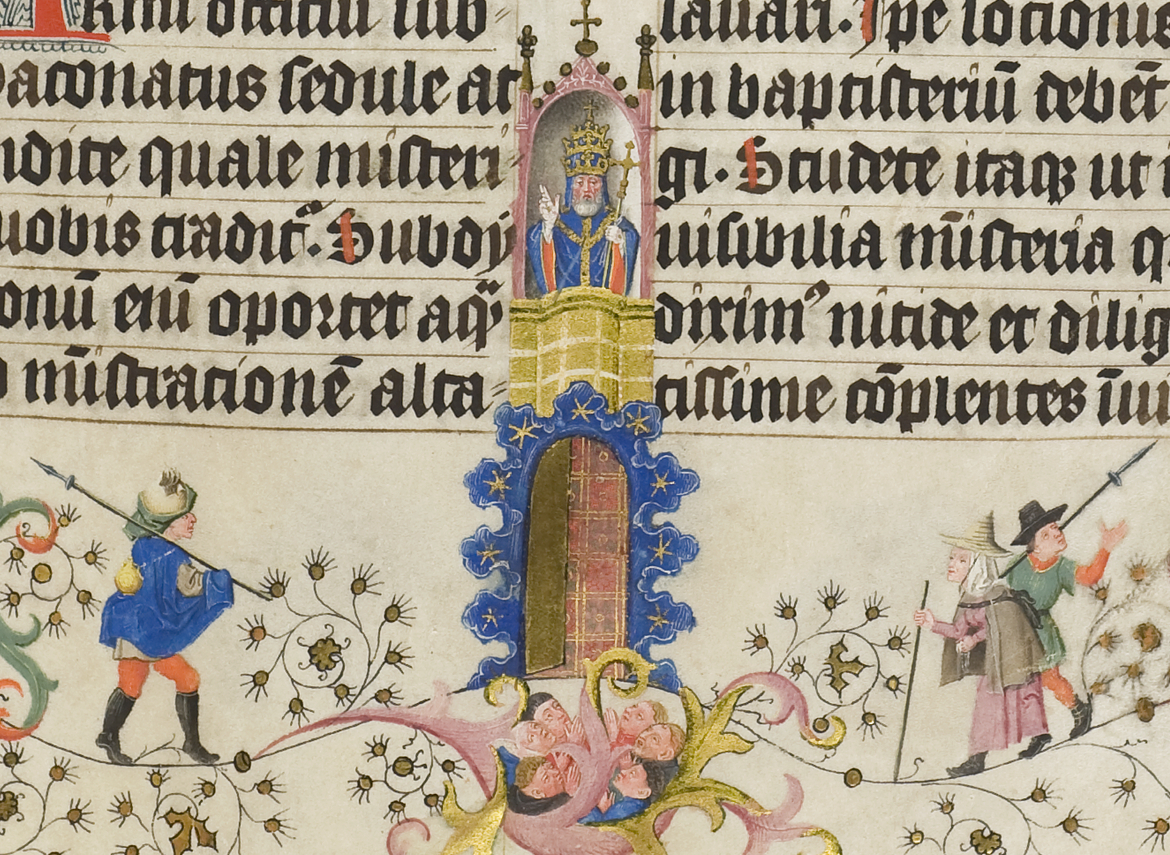 Hs. 400, f. 16r. Detail van de marges: Pelgrims onderweg naar de paaszegening van de Paus boven een half-open deur.